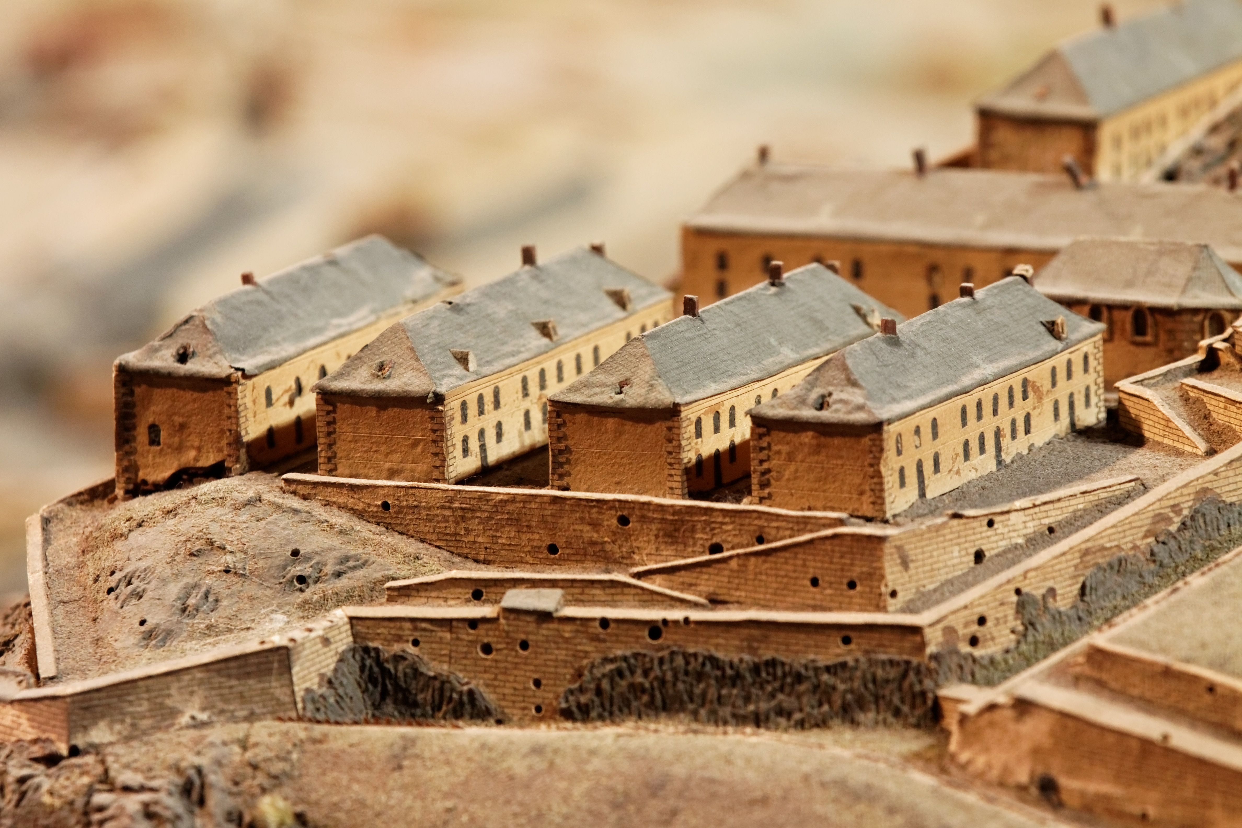 Plan-relief de Briançon en 1736. Plan-relief construit de 1733 à 1736 sous la direction de Colliquet et Nicolas de Nézot (1699-1768). Échelle 1/600e